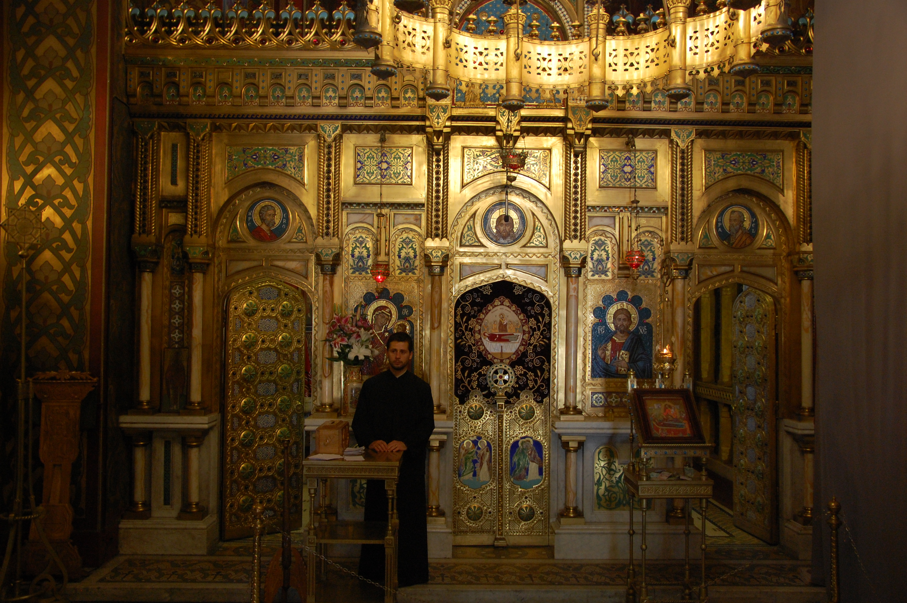 Altar mit Priester. Es werden Fürbitten entgegengenommen.